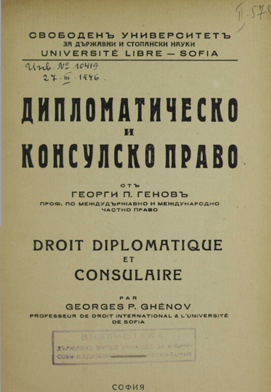 Дипломатическо и консулско право - Генов, Г.